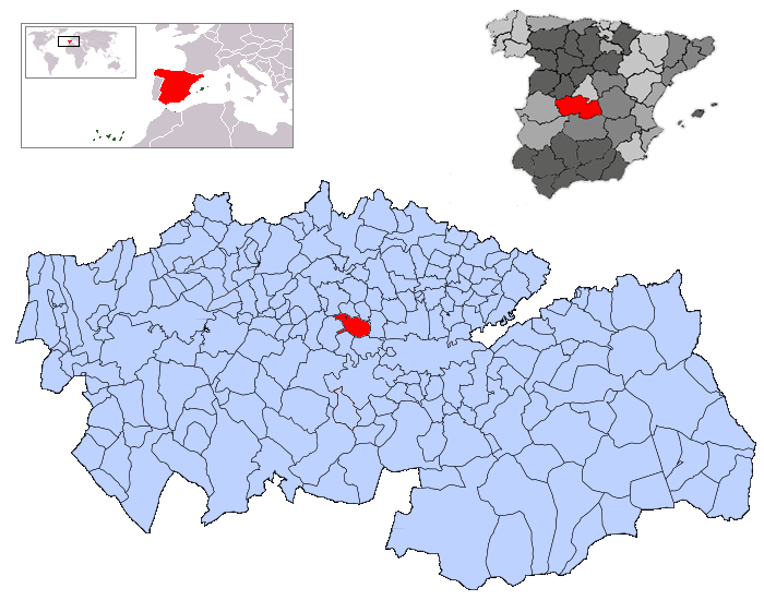 Gerindote en la provincia de Toledo